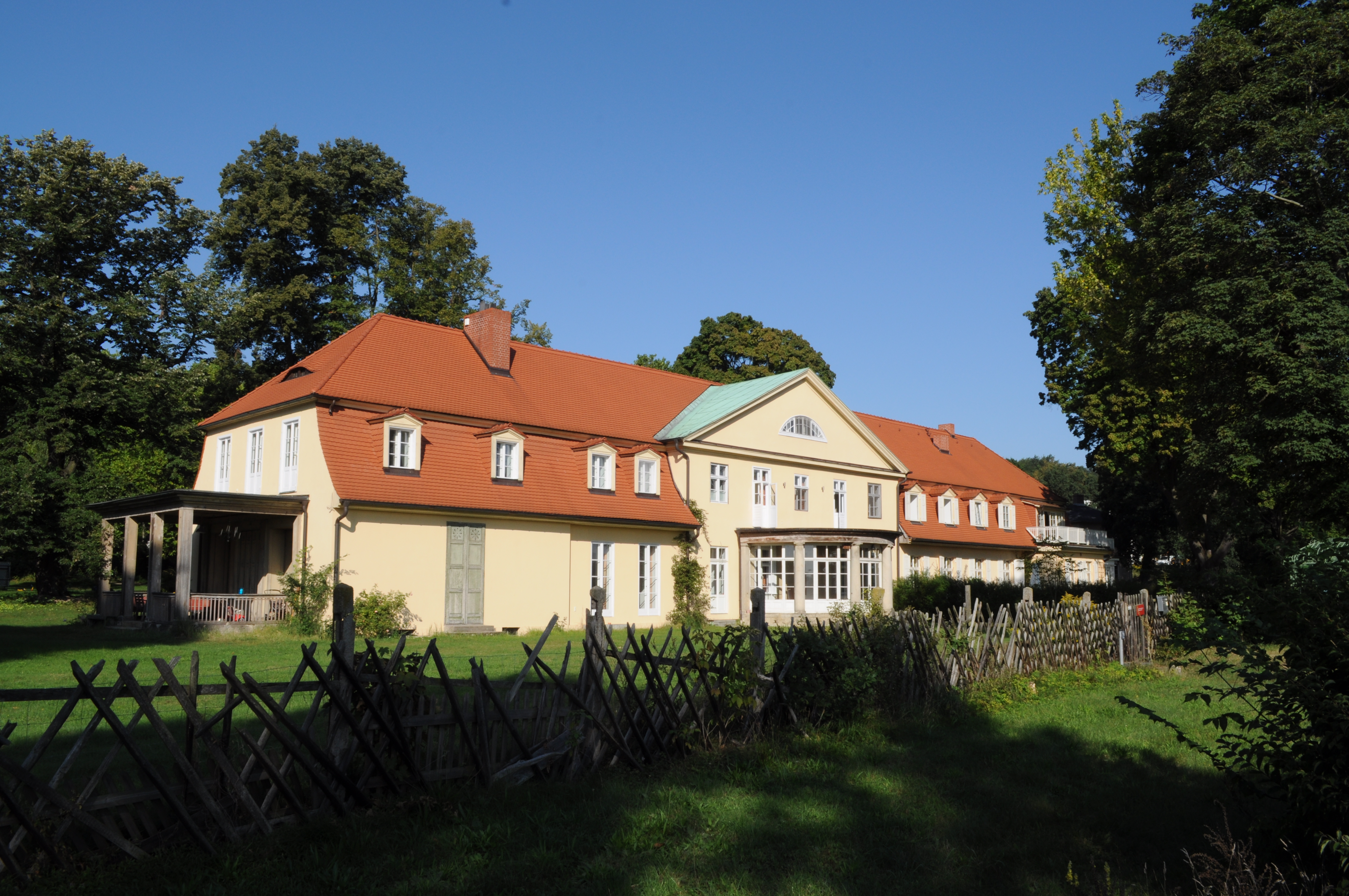 Villa Mendelssohn, Potsdam, Bertinistrasse, 2012